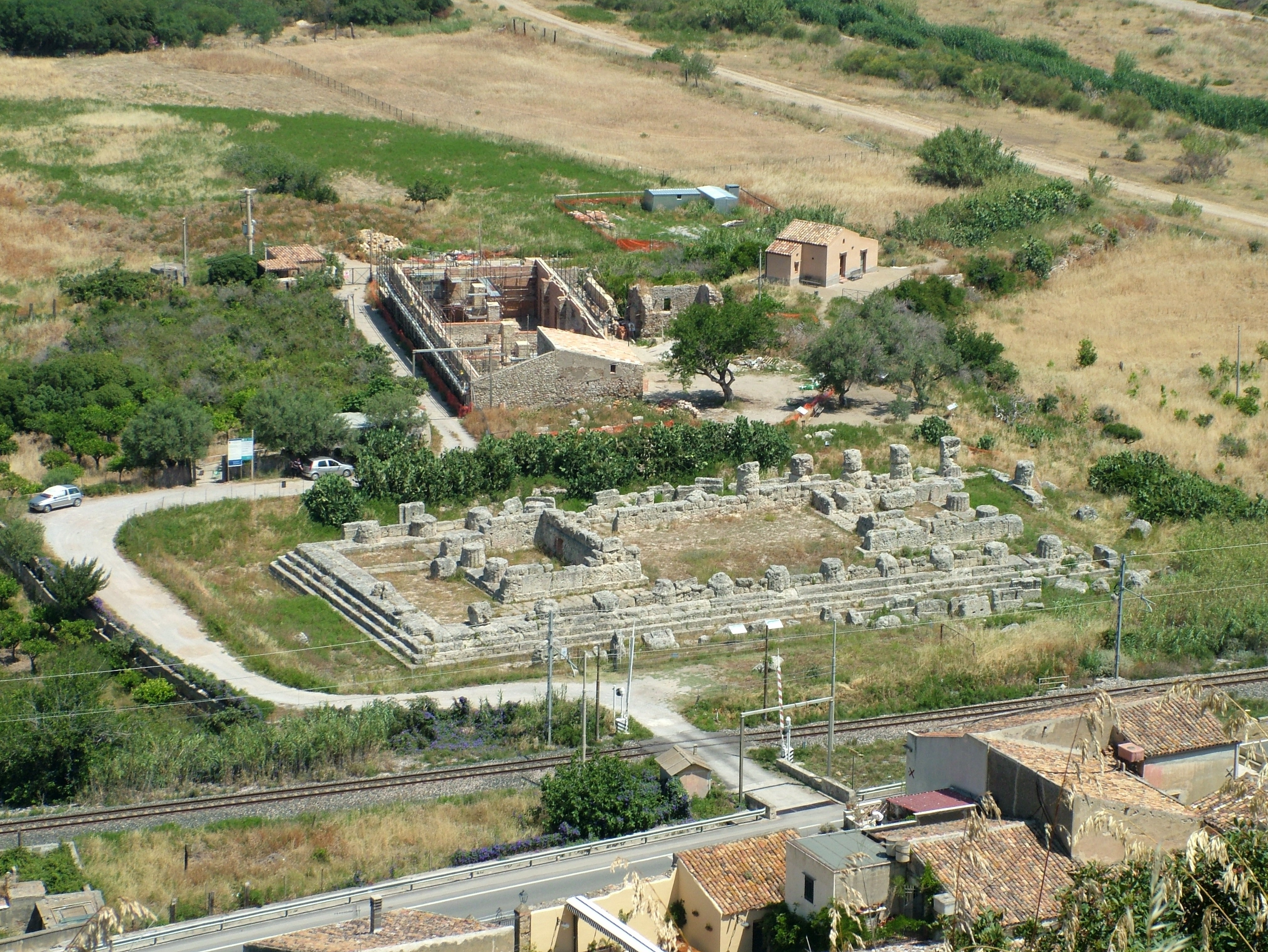 Sizilien, Himera der Viktoriatempel vom Antiquarium aus